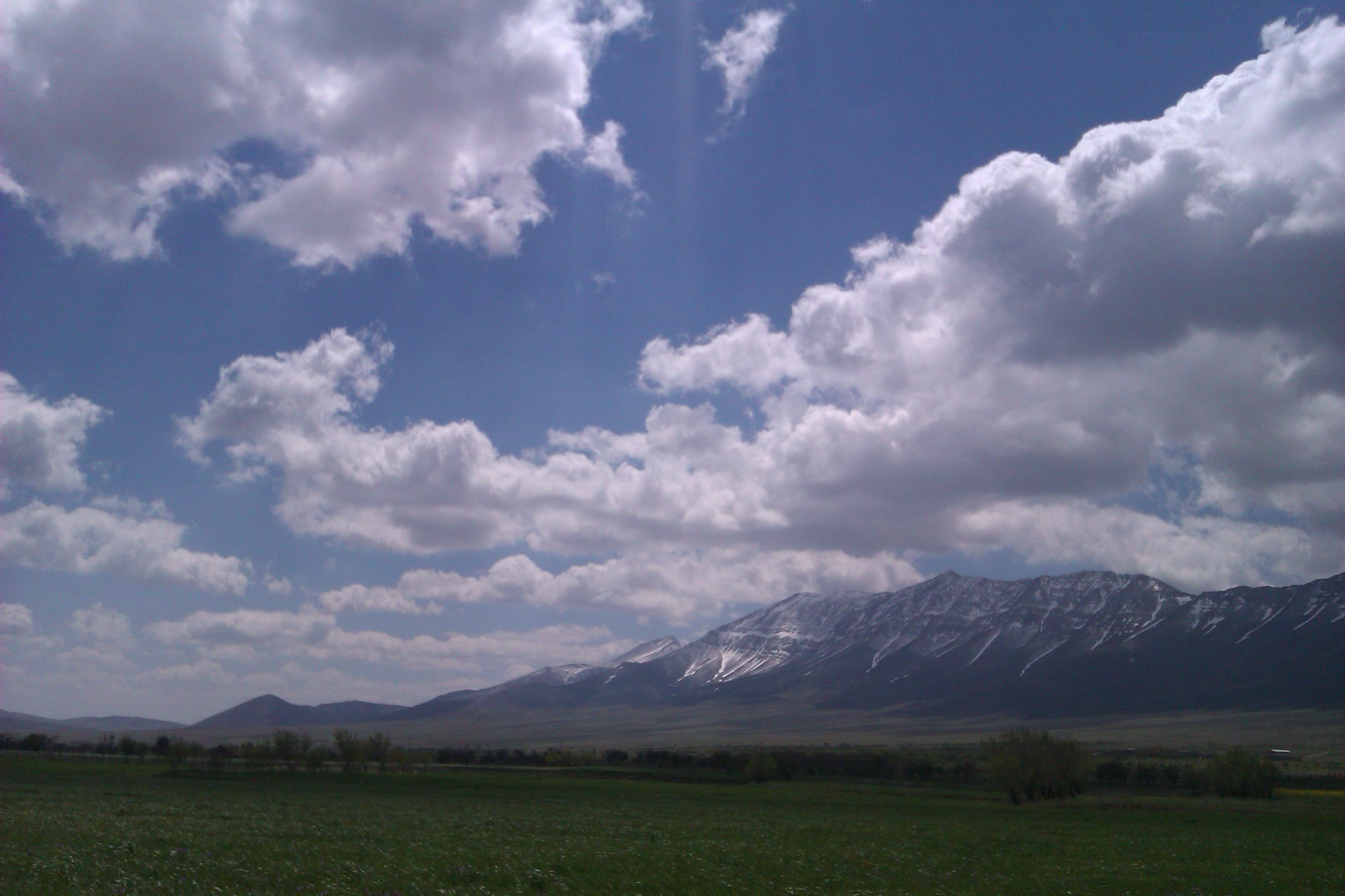 رشته کوههای کمر بسته روستای فرج آباد